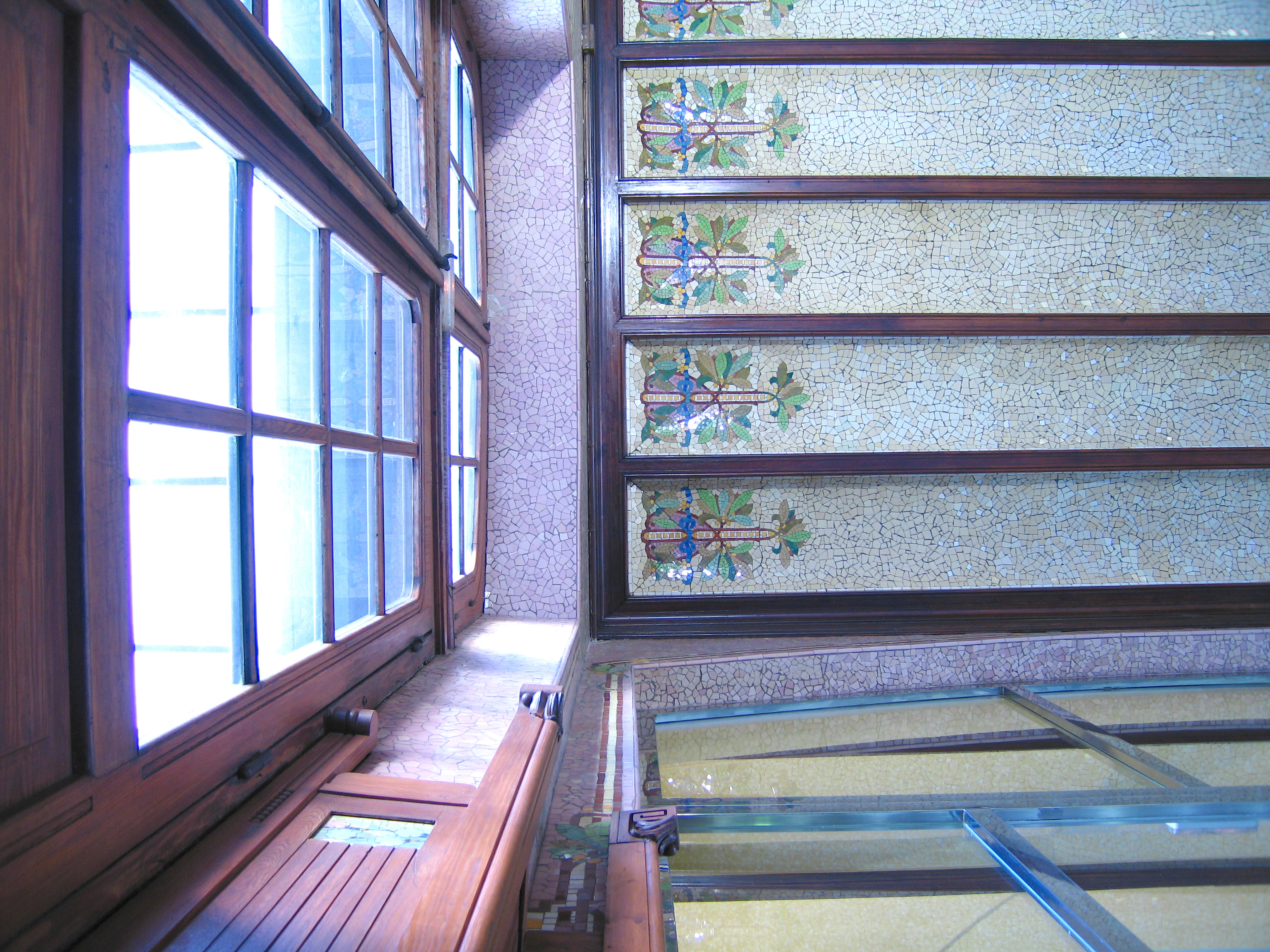 estació nord València